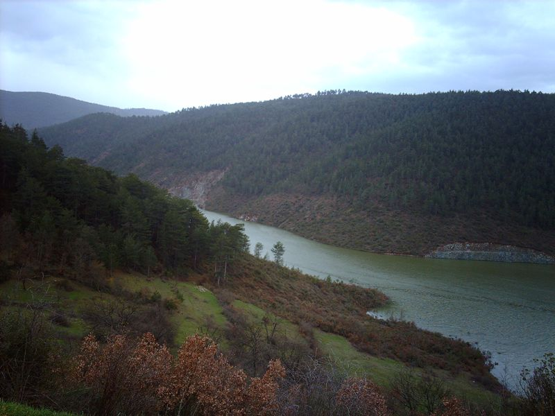 ÇINARÇIK BARAJI YENİ SU TUTULMAYA BAŞLANDI